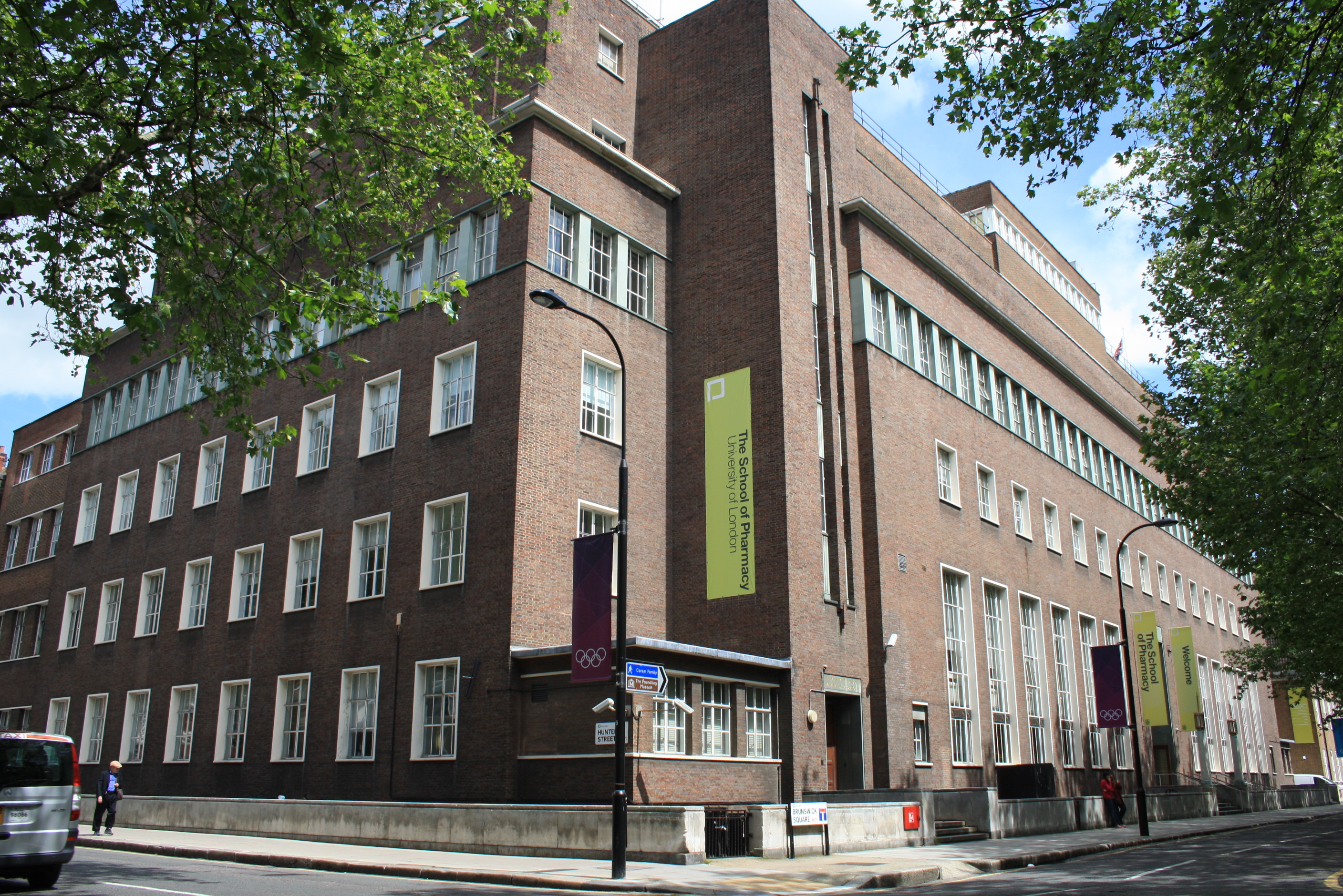 UCL School of Pharmacy, Brunswick Square, London WC1N 1AX, UK.